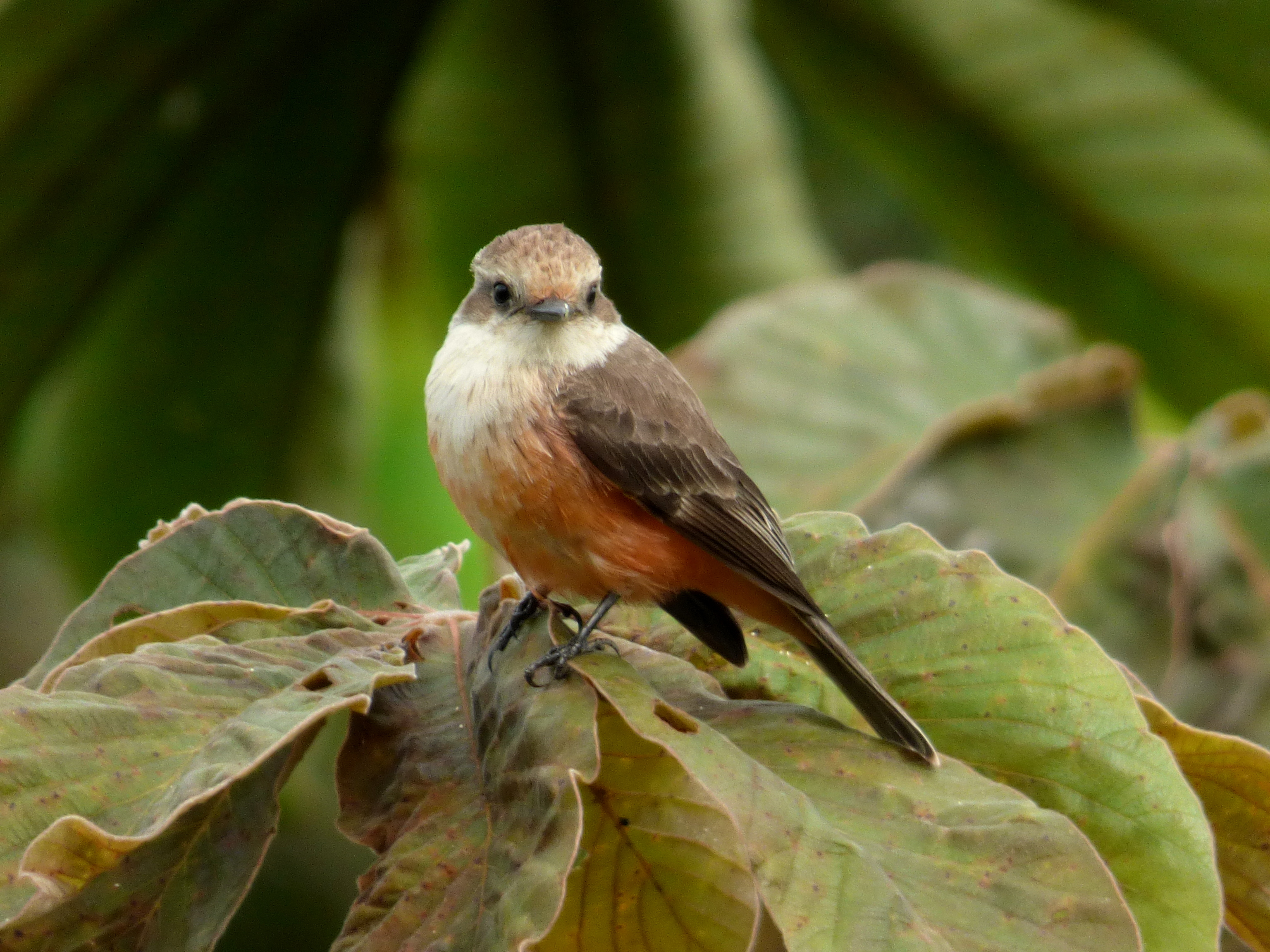 Pyrocephalus rubinus (Pechirrojo, Petirrojo, Cardenal) - Hembra